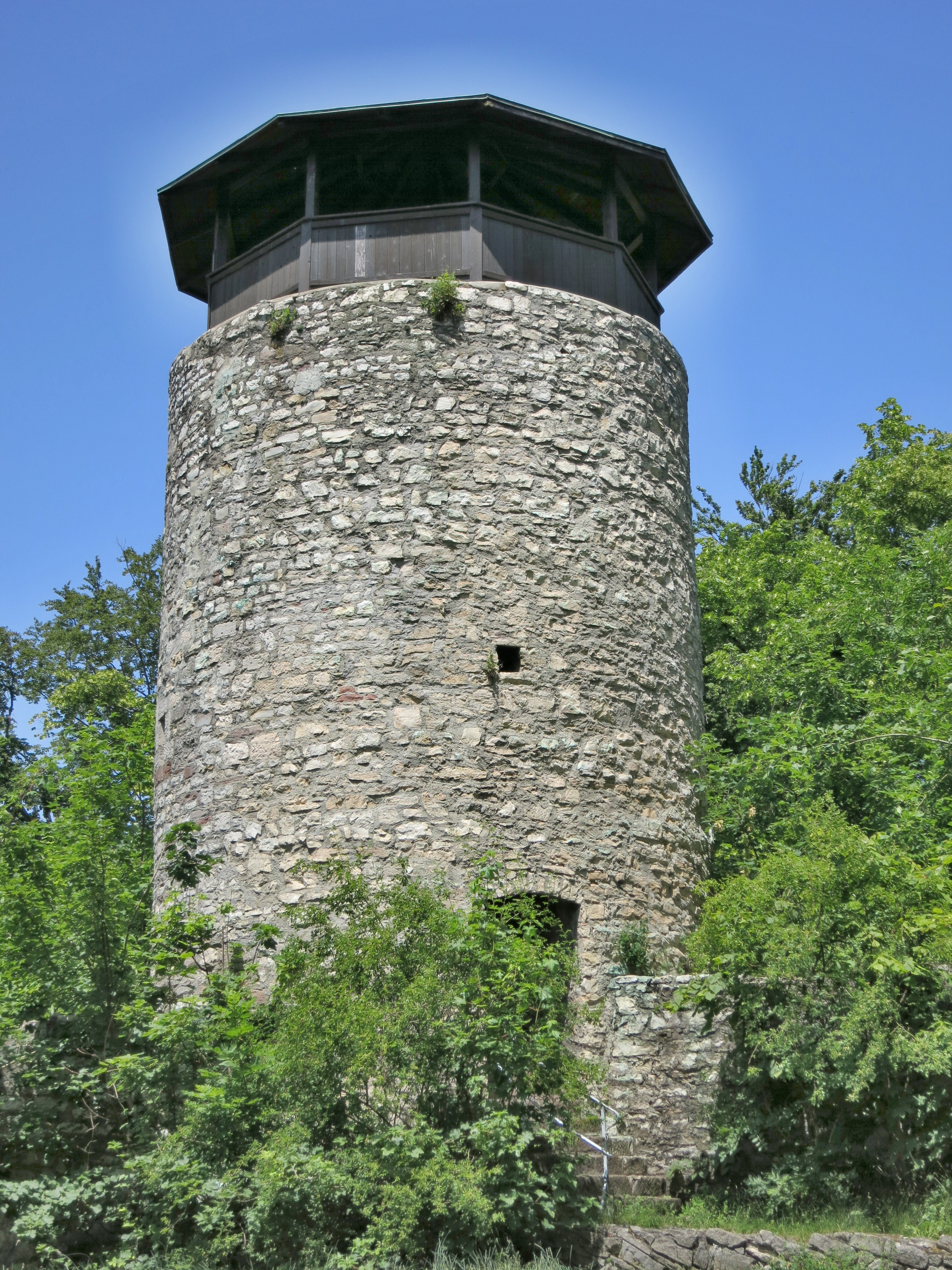 Hintere Wartenberg